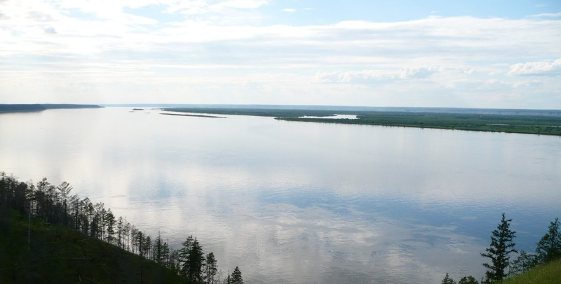 River Lena near Jakutsk